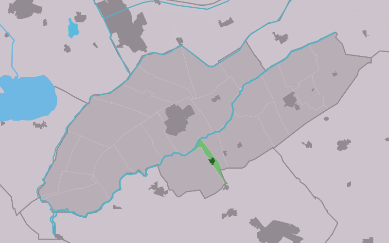 Kaartsje fan himrik fan De_Blesse